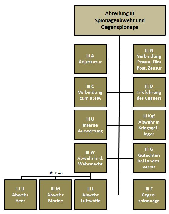 Struktur der Abteilung III der deutschen Abwehr